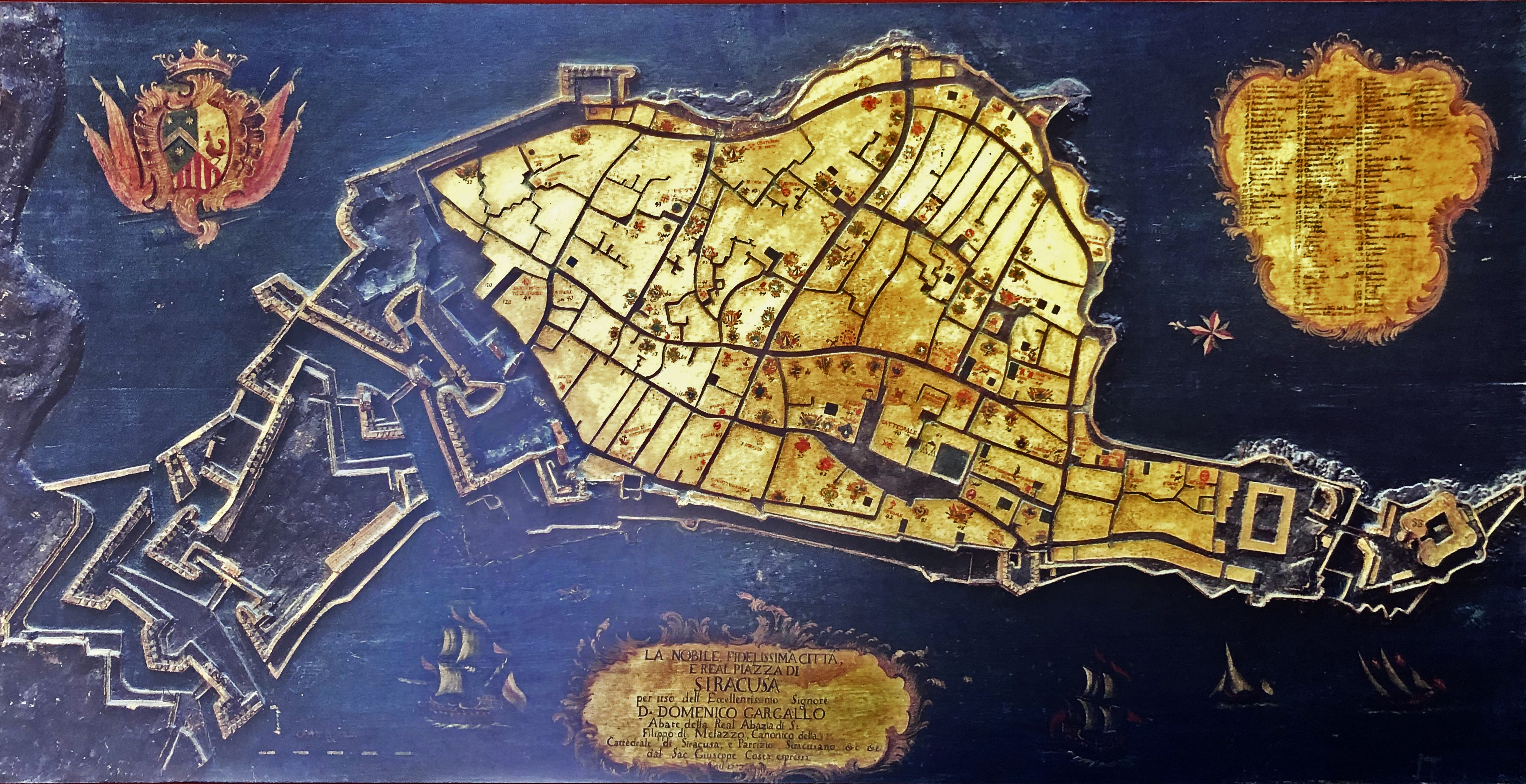 Antica mappa di Ortigia